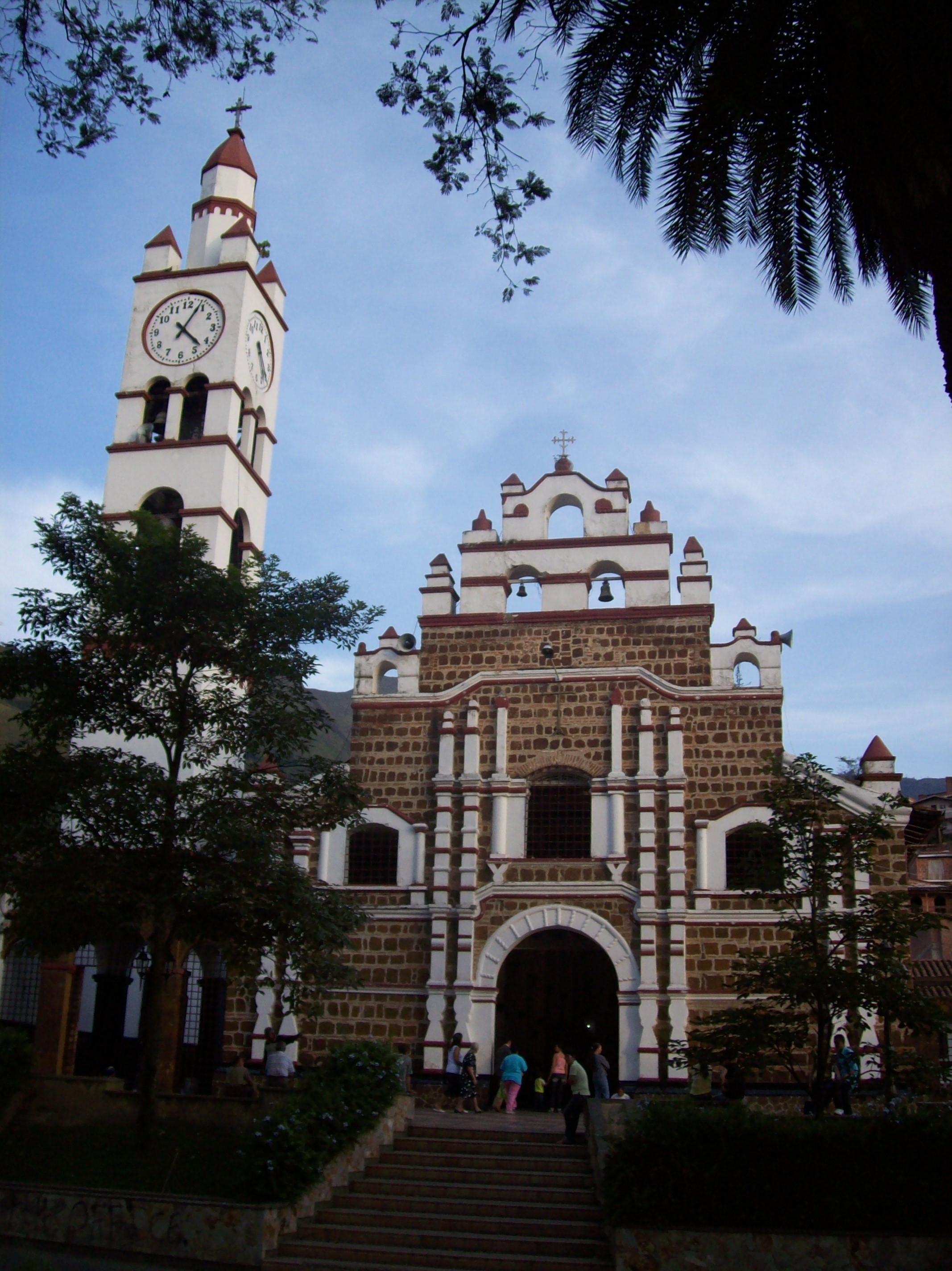 Iglesia principal de Copacabana.